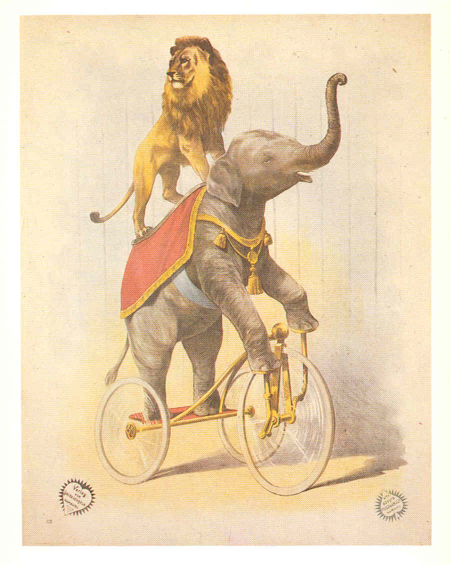 Plakat für Carl Hagenbecks Zoologischen Circus - Löwe auf Elefant Farblithographie